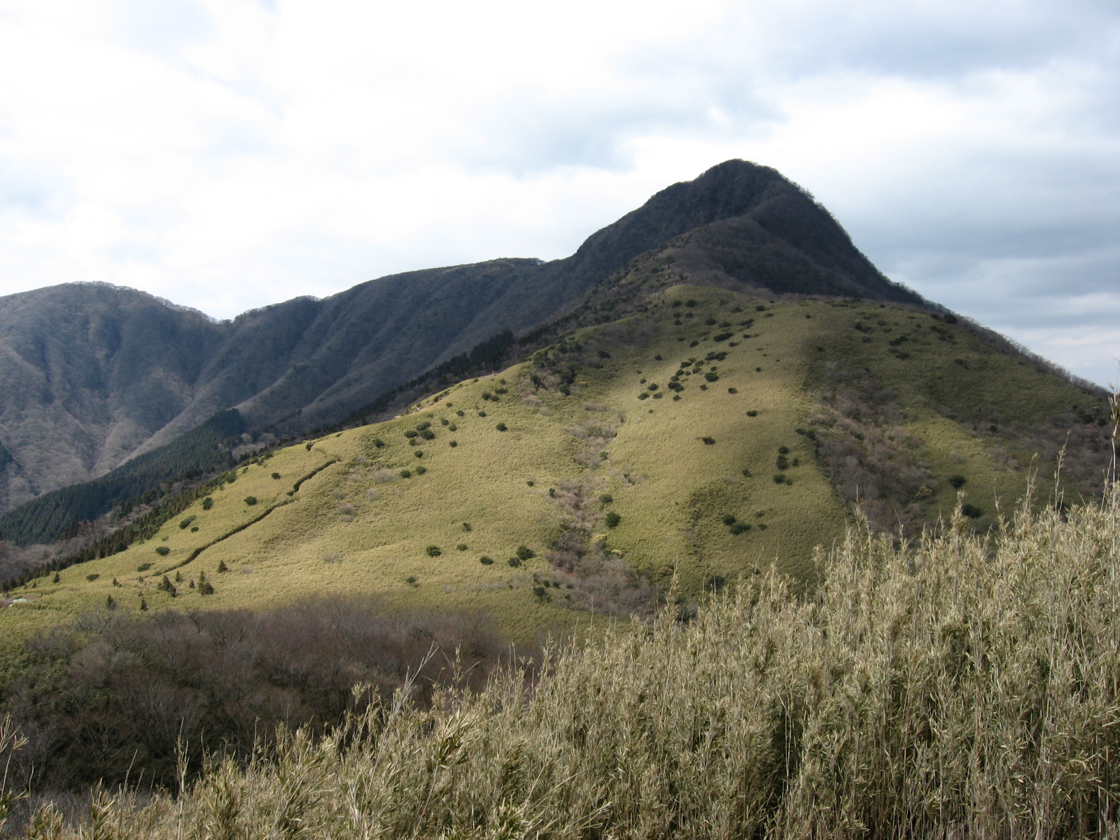 矢倉沢峠付近から仰ぐ金時山